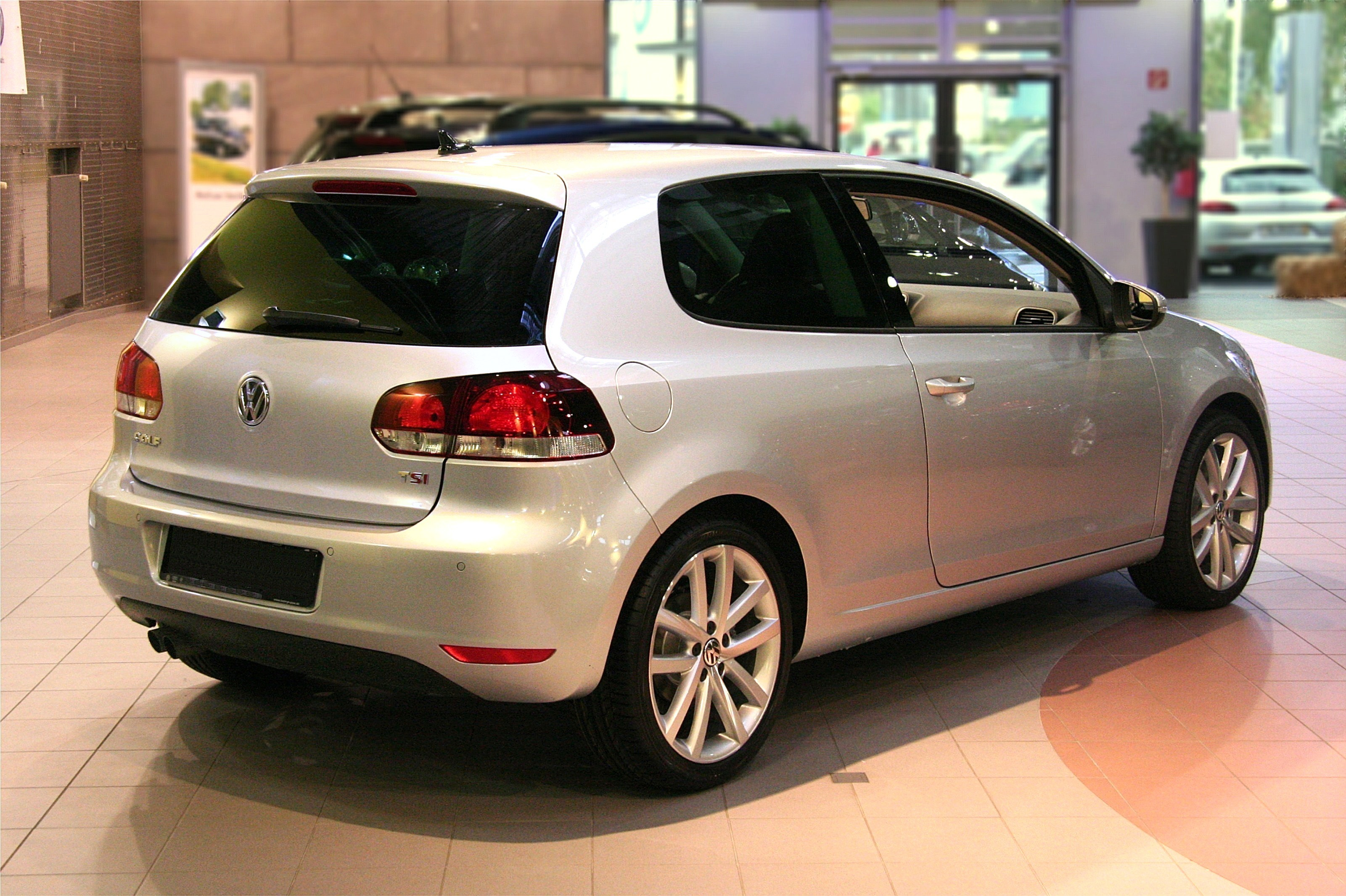 VW Golf VI TSI (Heck)